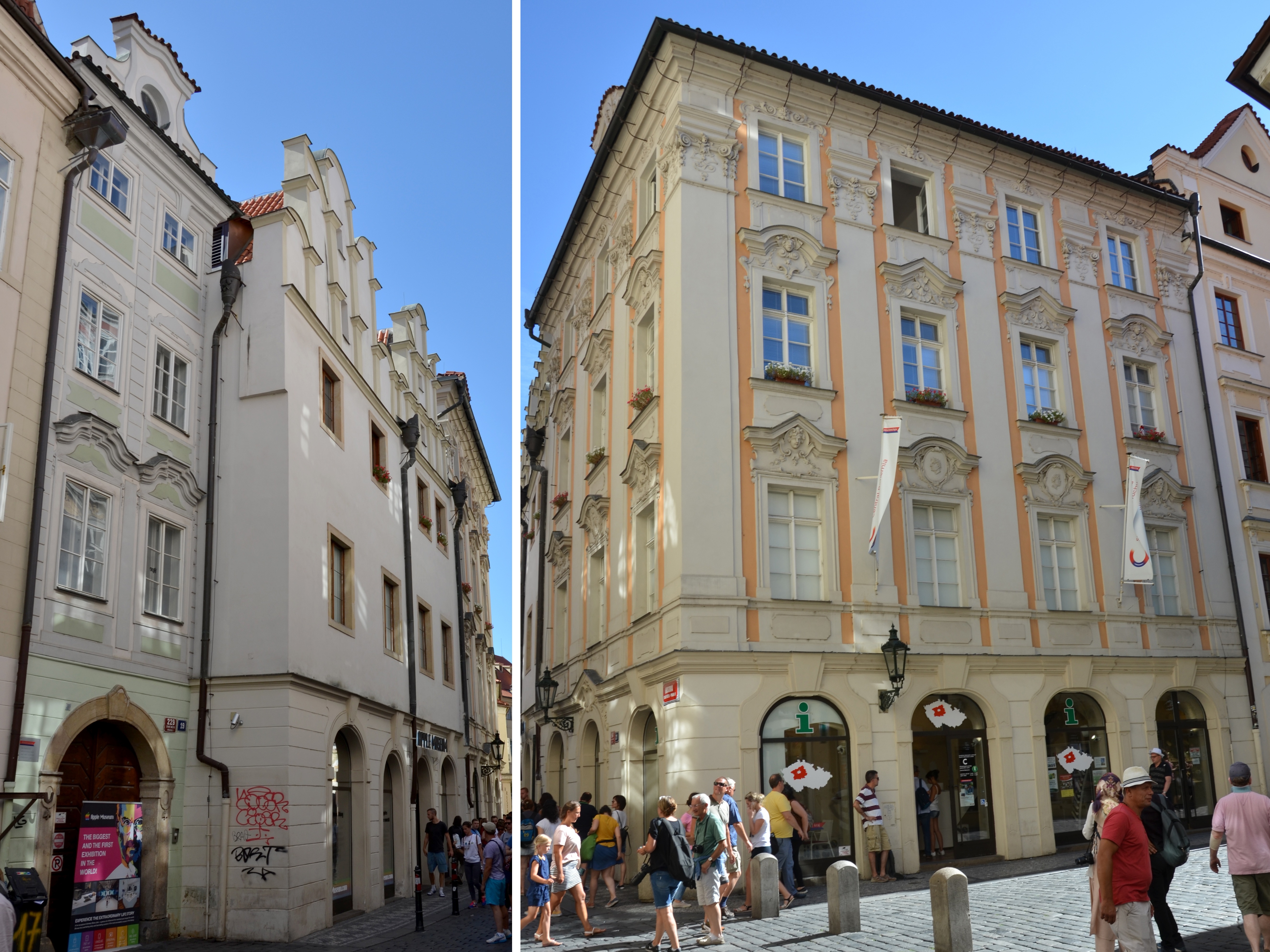 Dům čp. 19 a čp. 20 U klíčů (s renesanční fasádou), čp.21 U Zlaté slámy Husova, Praha 1